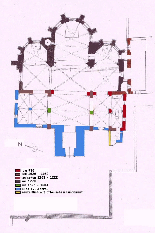 St. Peter - Grundriss mit farblicher Kennzeichnung der Bauperioden (eigene Gestaltung) - Quelle: Grundriss in Dietrich Höroldt (Hrsg.): 1000 Jahre Stift Vilich 978 - 1978, Bonn, 1978, S. 123